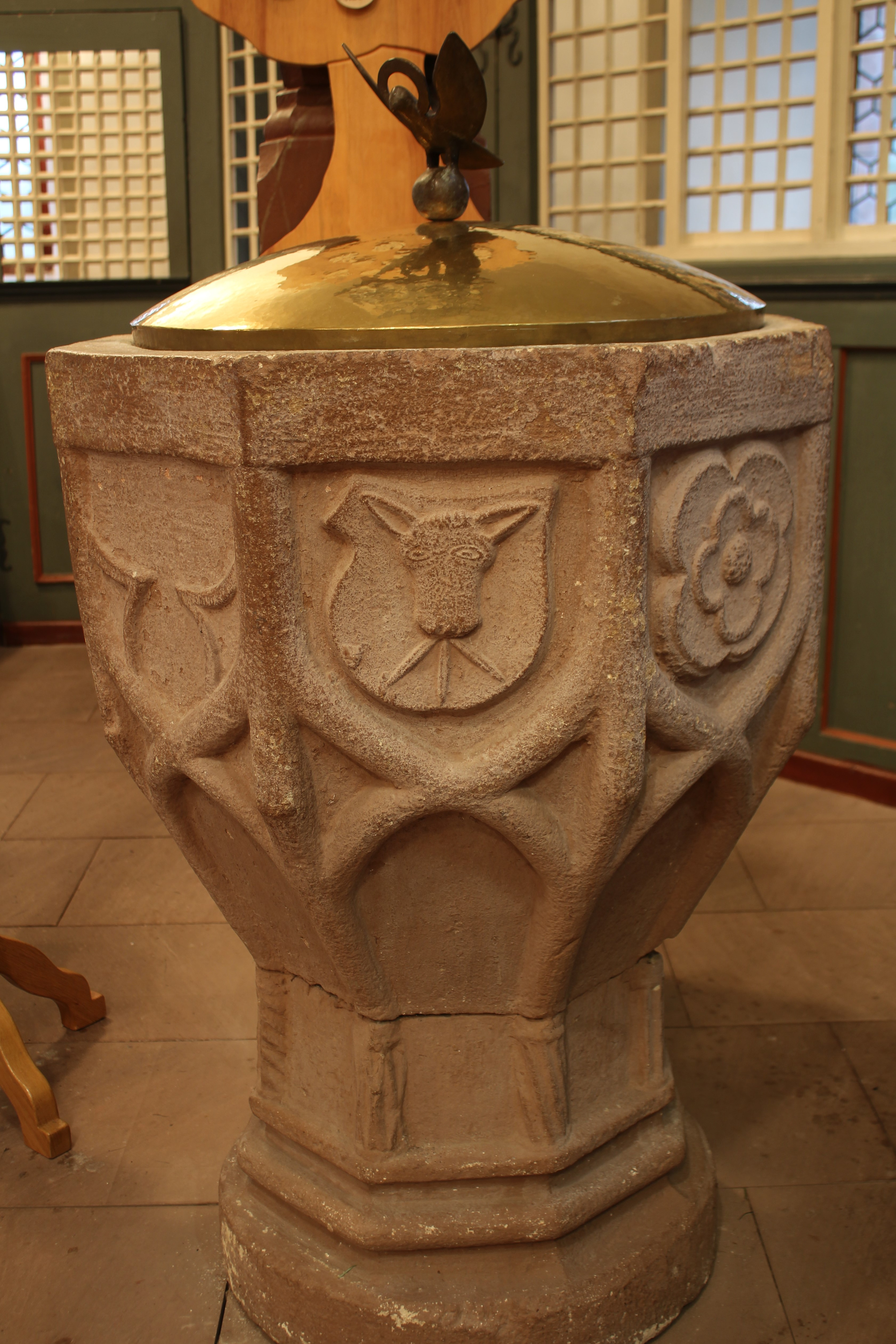 Evangelische Kirche Groß-Eichen, Mücke, Vogelsbergkreis, Hessen, Deutschland